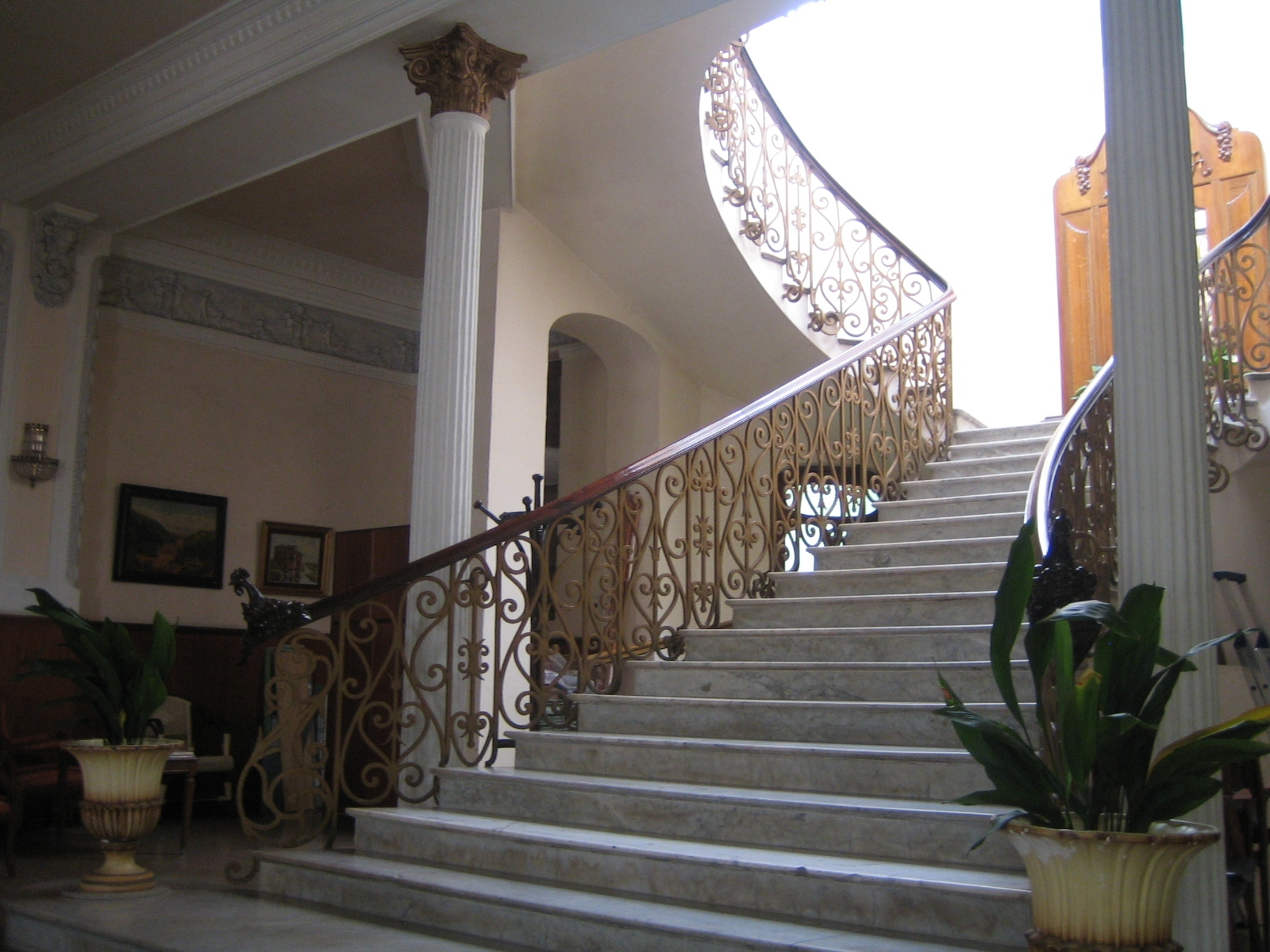 Escalera principal del Círculo Alzireño en Alzira (España).